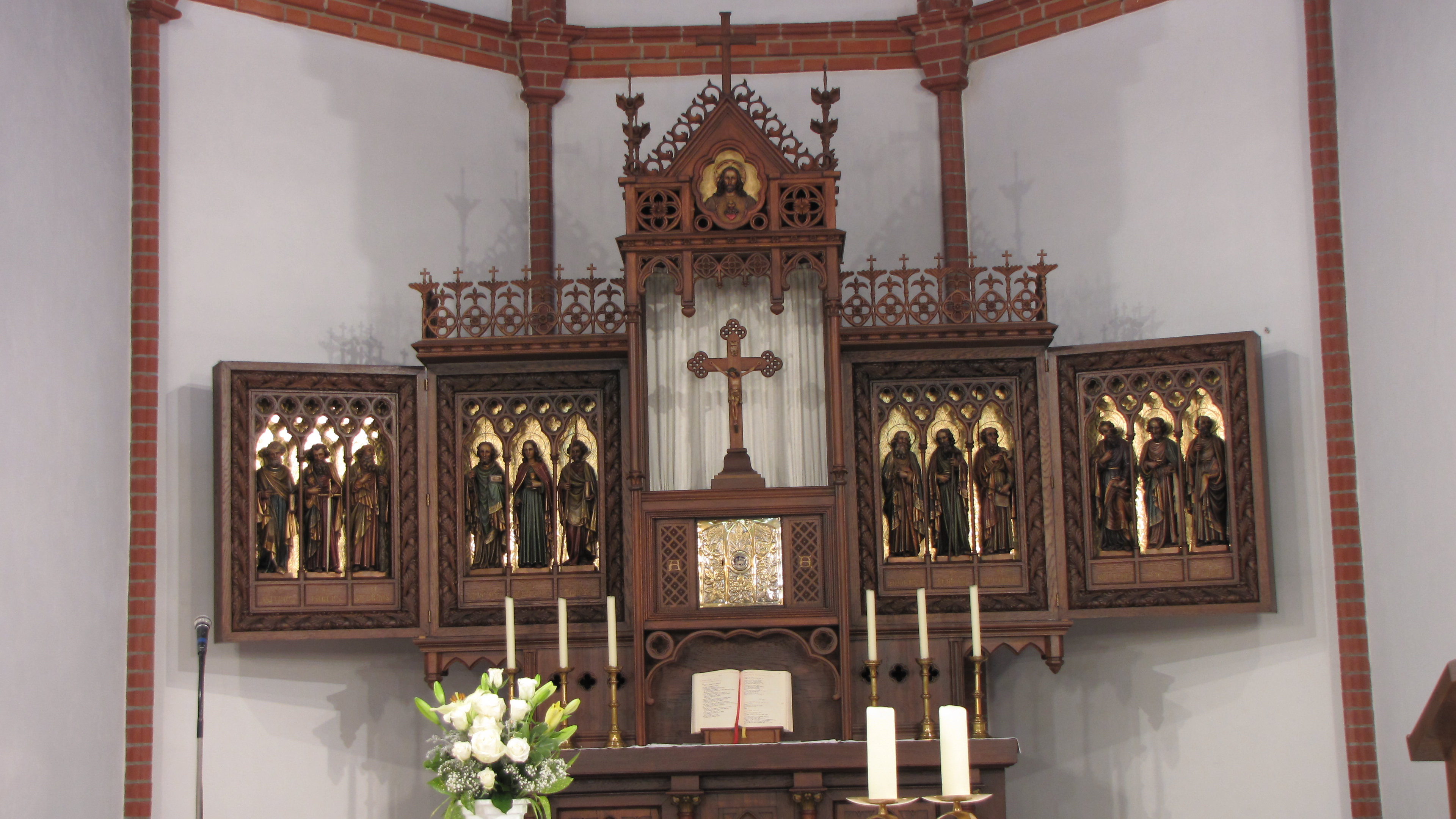 Kath. Kirche Demmin - Altar